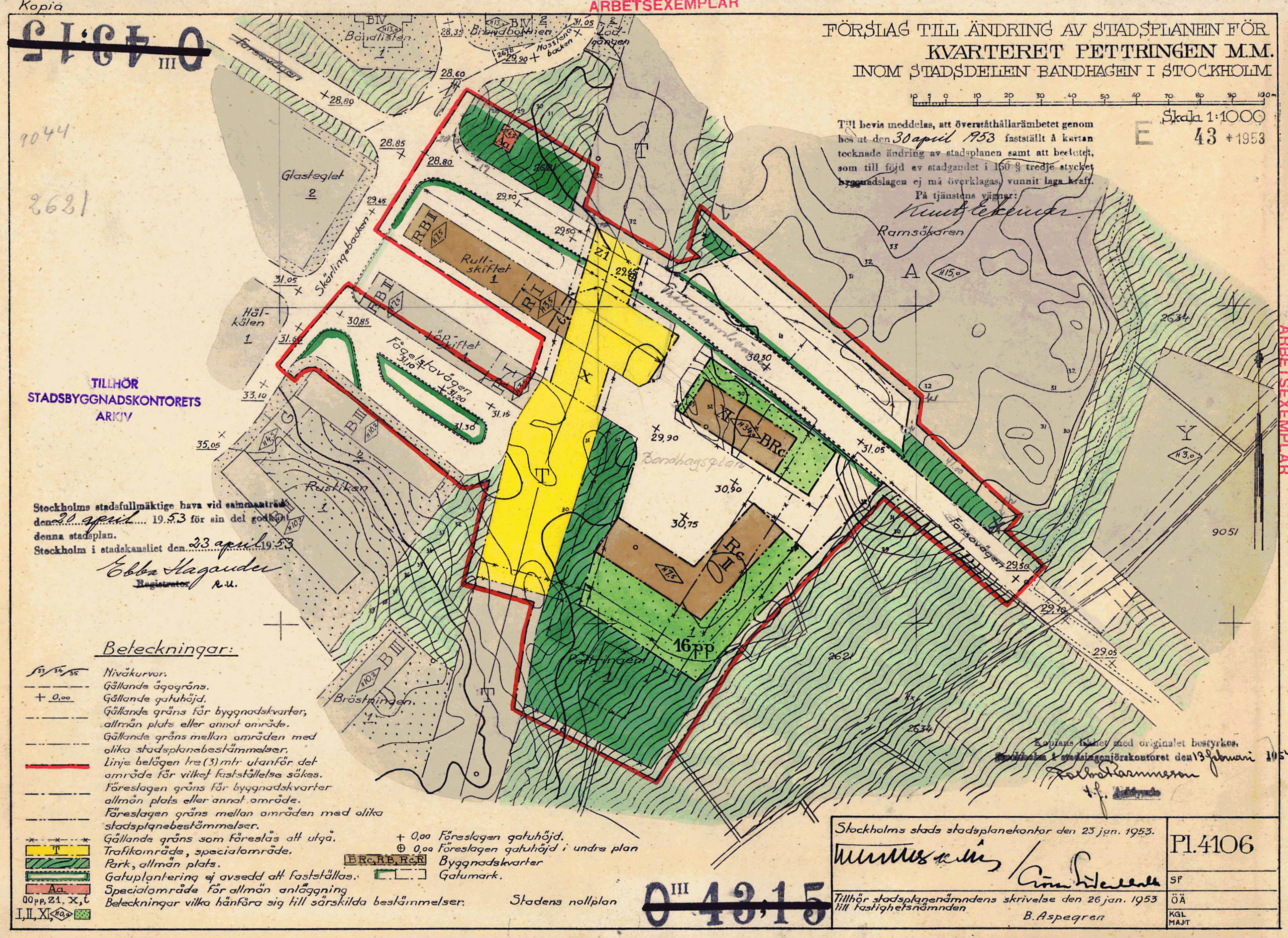 Stadsplan Pl 4106 för Bandhagens centrum